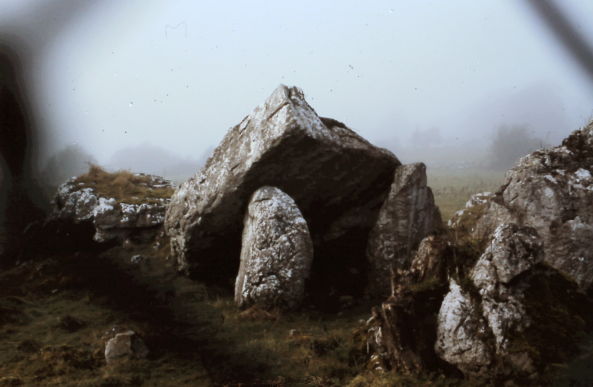 Knockanyconor